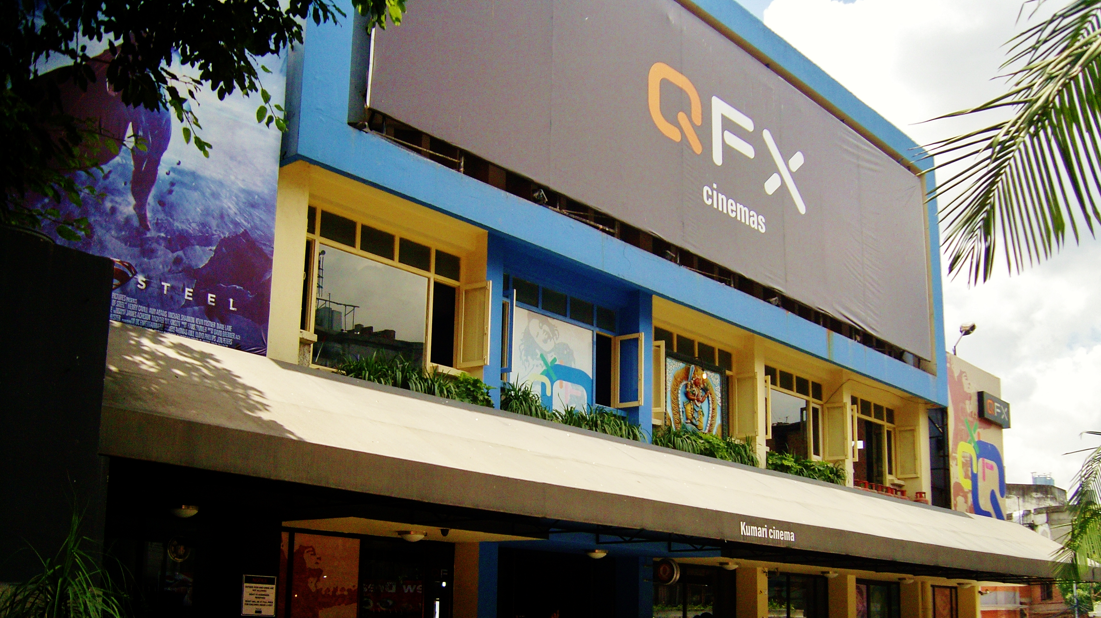 नेपाली: QFX को मुख्य बोर्ड